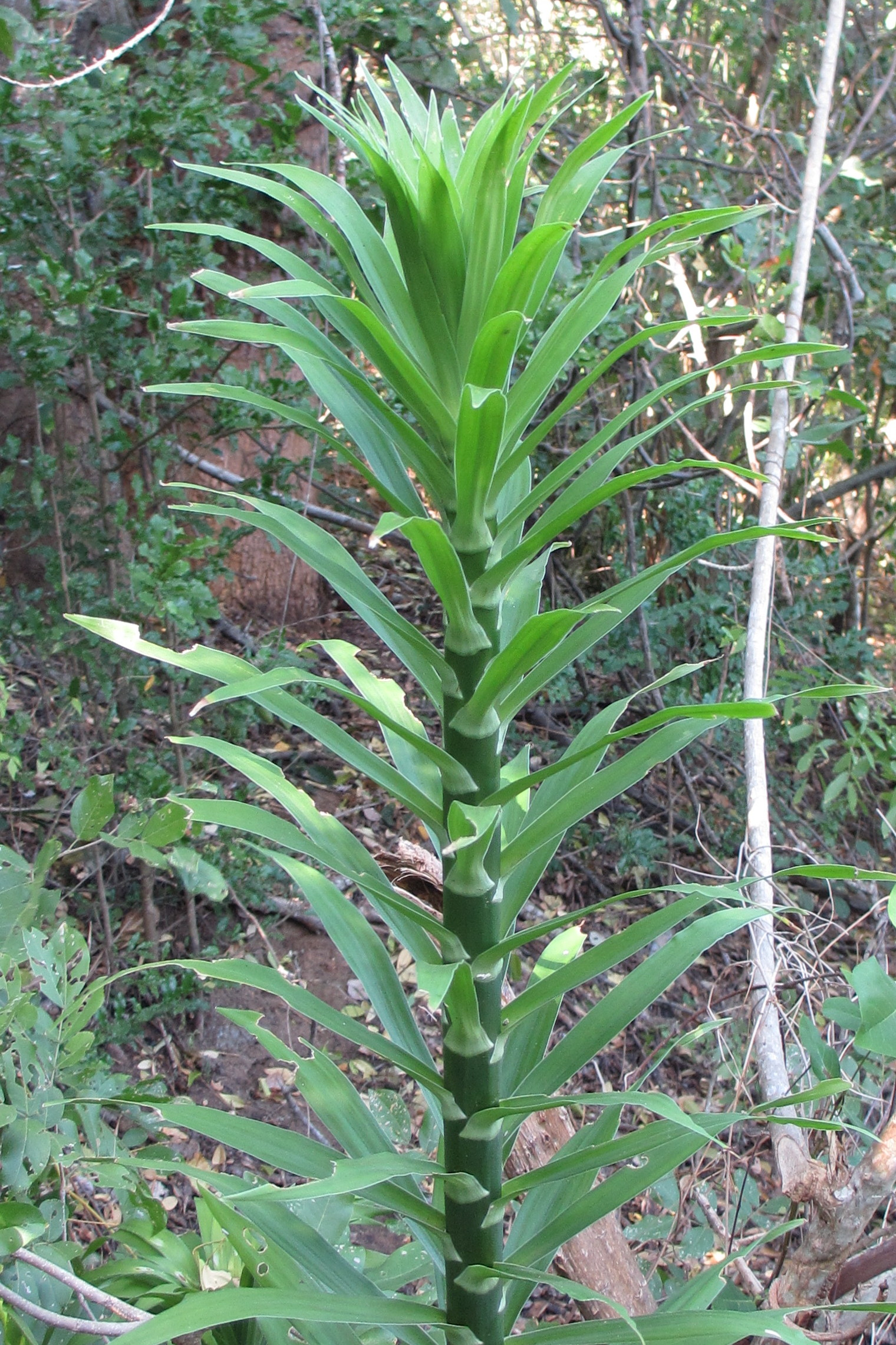 Dracaena reflexa - shoot